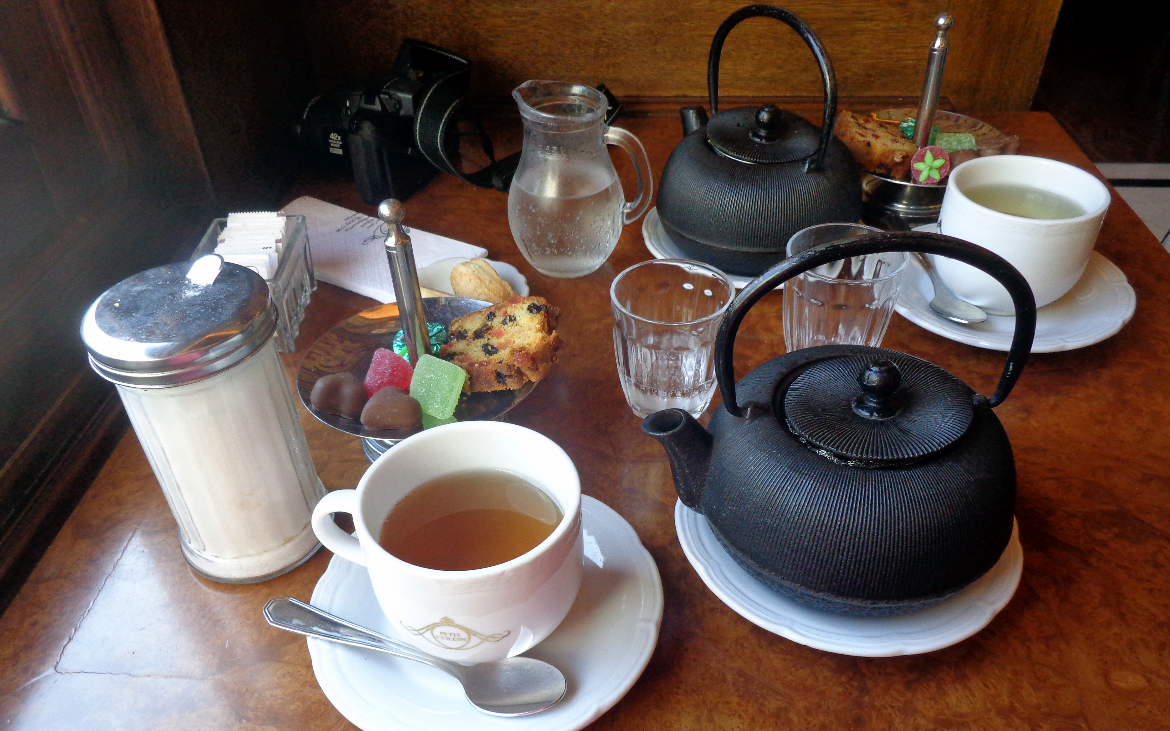 Petit Colón es un café y confitería notables situado en la esquina de las calles Lavalle y Libertad (Libertad 505), junto a la Roque Sáenz Peña (Diagonal Norte) en la ciudad de Buenos Aires, Argentina.